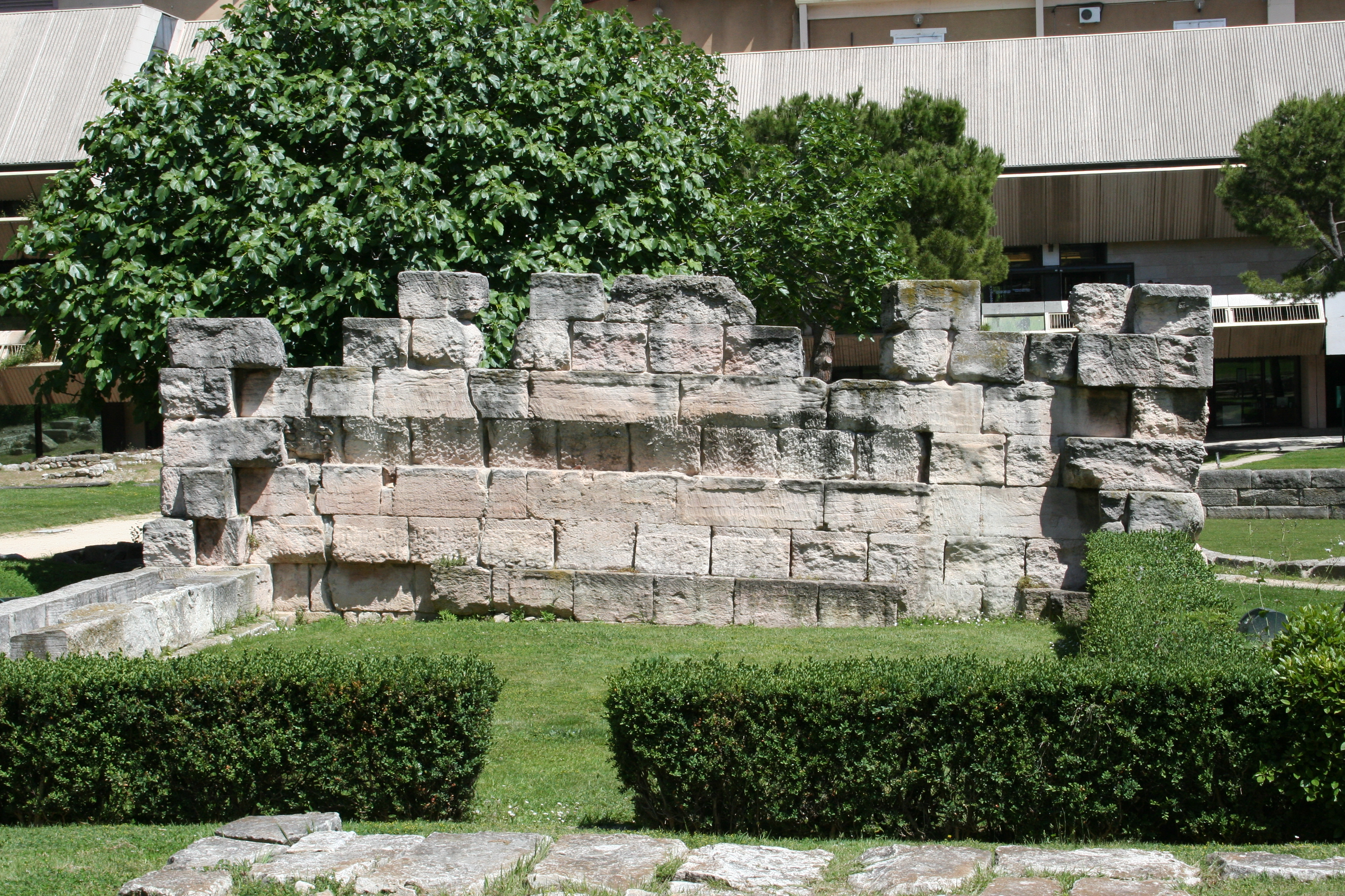 Tour penchée du jardin des vestiges à Marseille. Rempart grec du IIe siècle avant Jésus Christ.